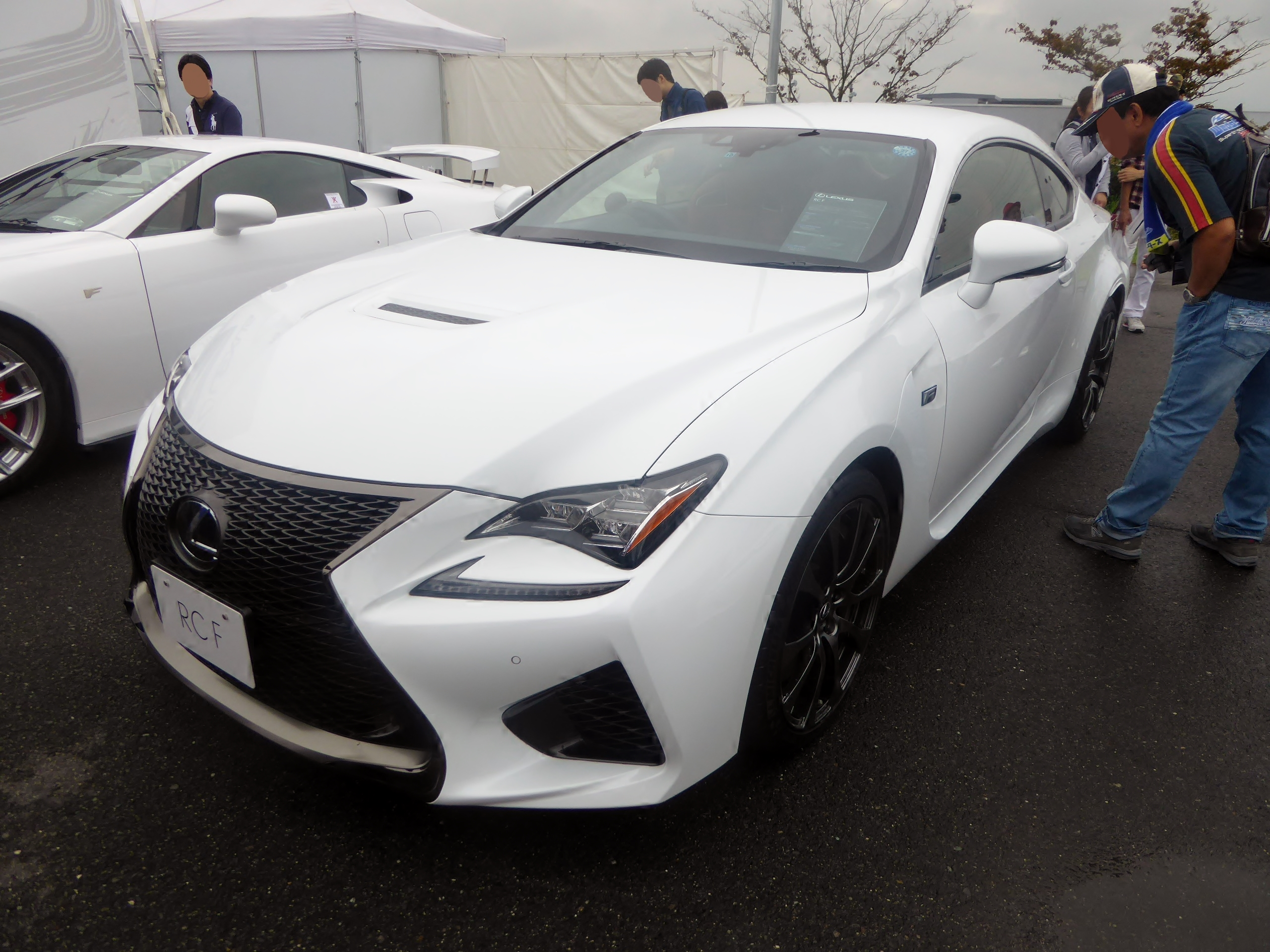 USC10型レクサス・RC Fをフロントから撮影。